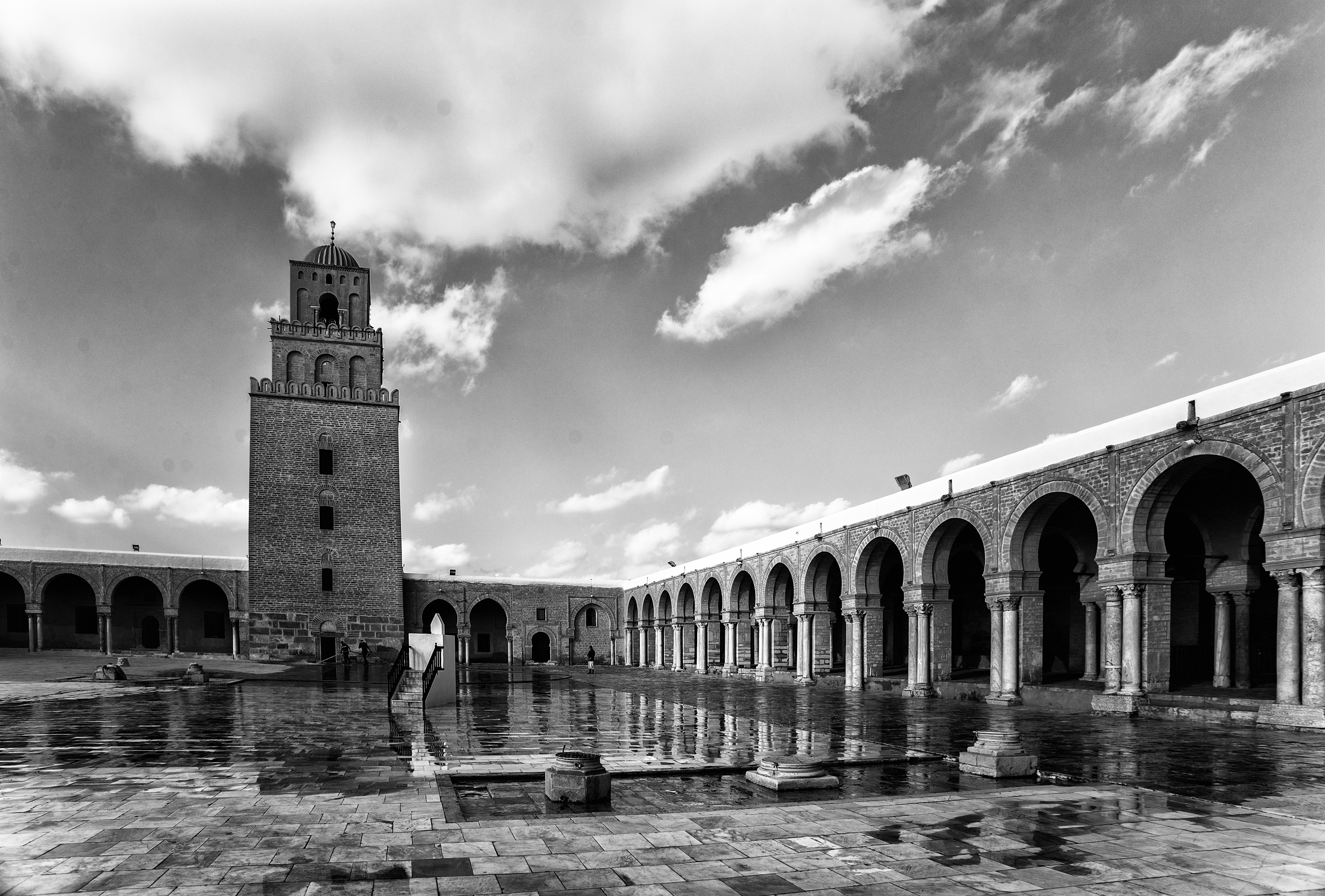 La Grande mosquée de Kairouan